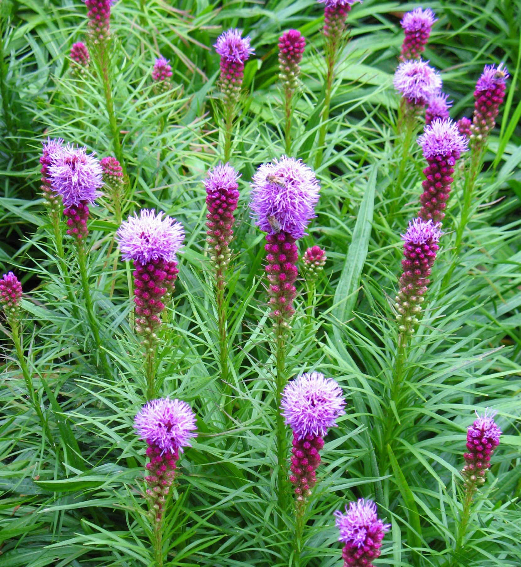 Liatris spicata